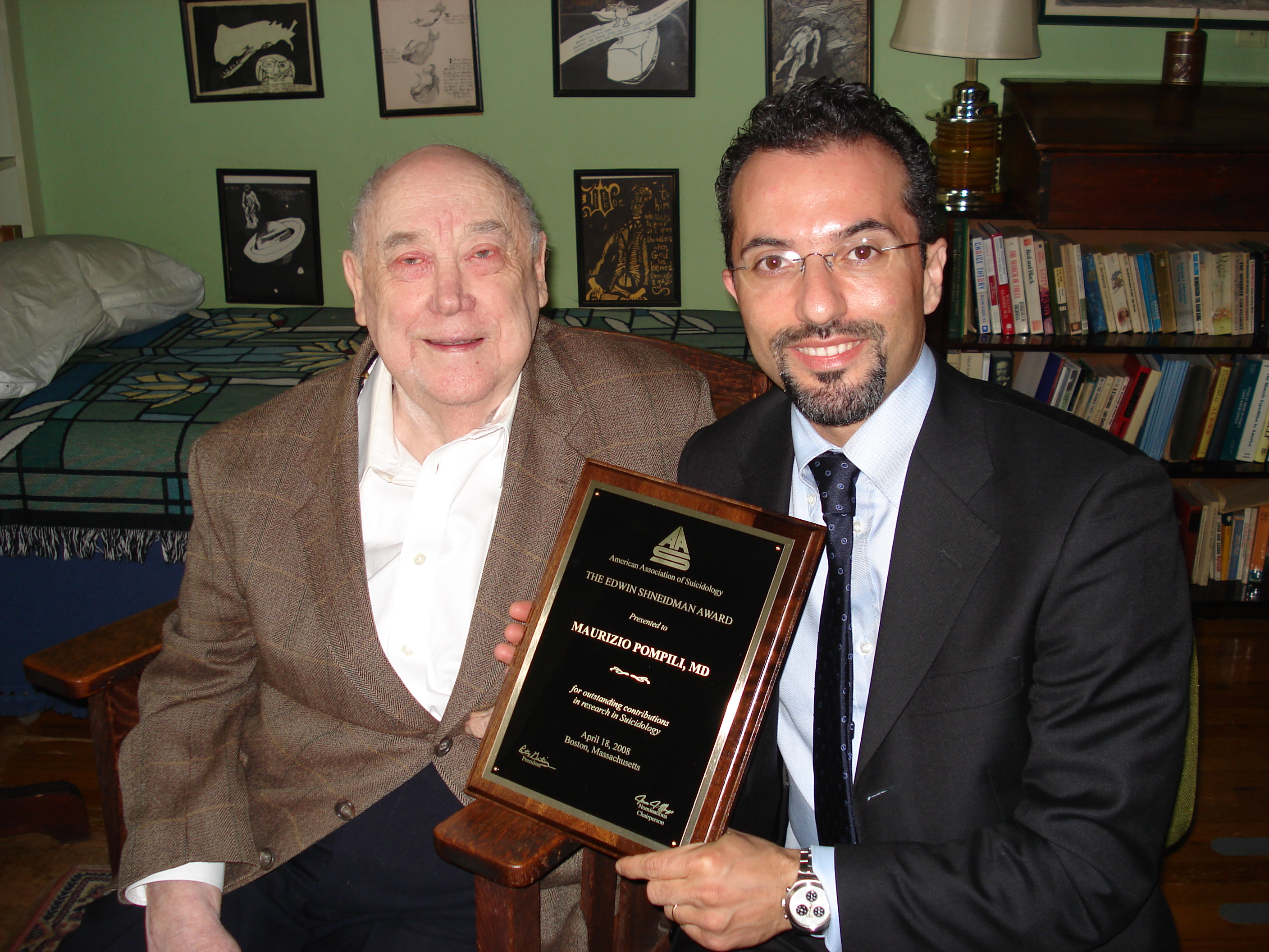 Foto scattata personalmente nella casa di Shneidman a Los Angeles in occasione dello Shneidman Award 2008